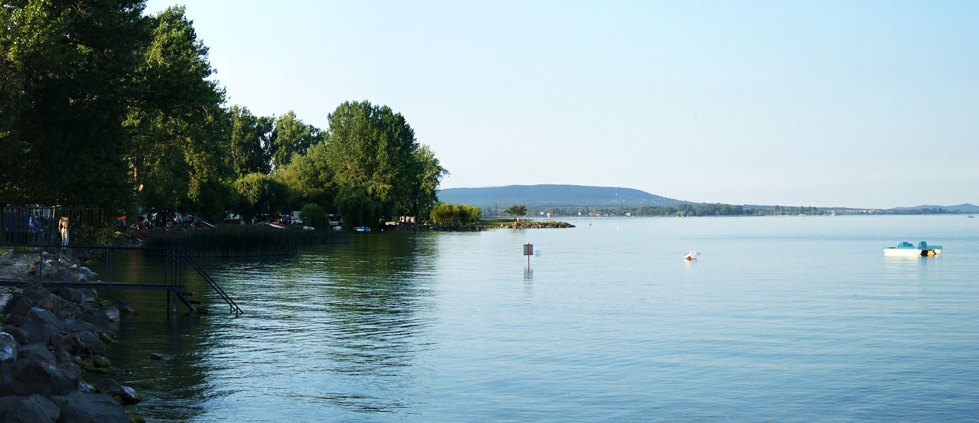 Balatonszepezd - kemp, 2008